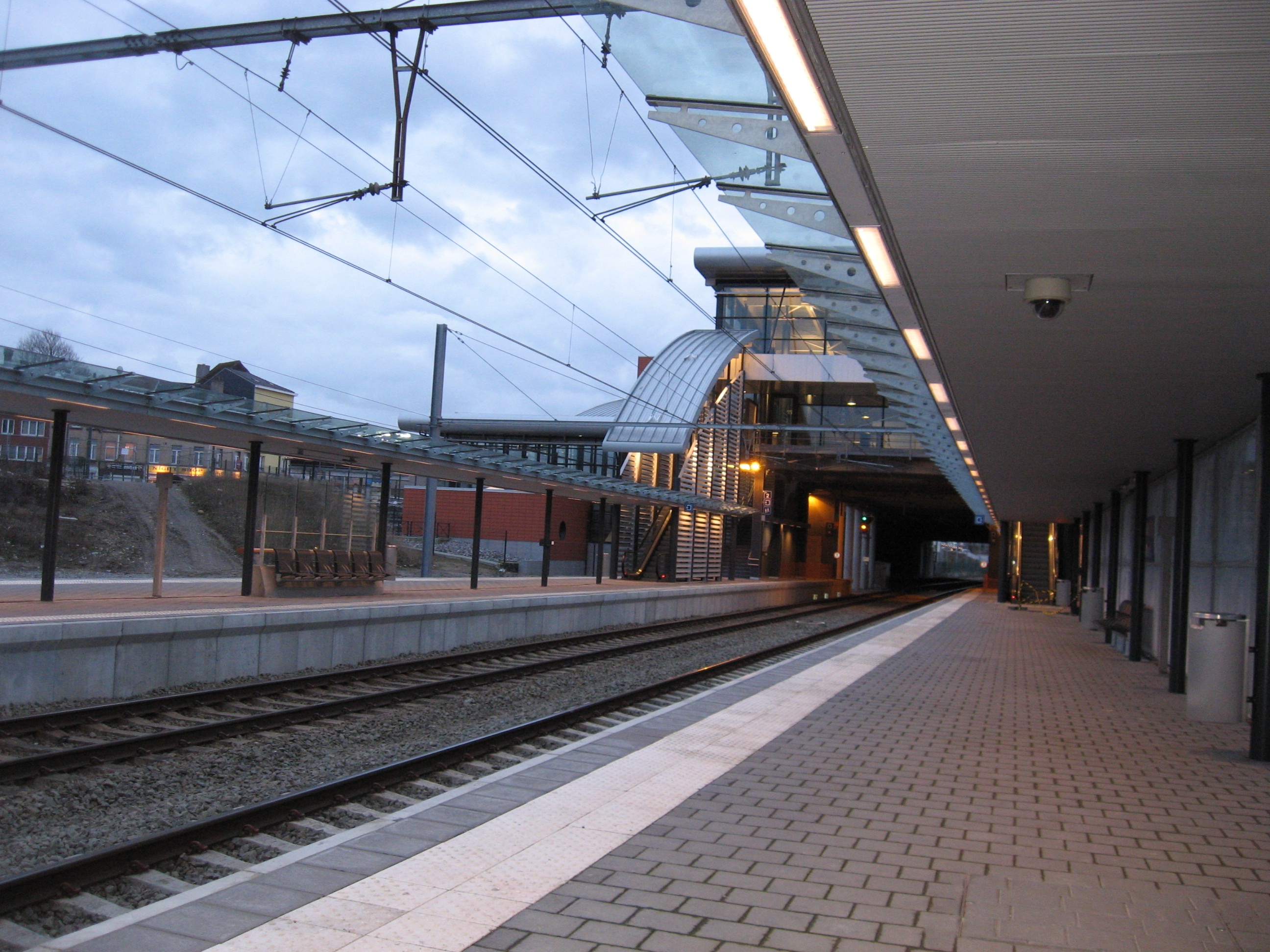 Weststation gezien vanaf het perron richting Jette